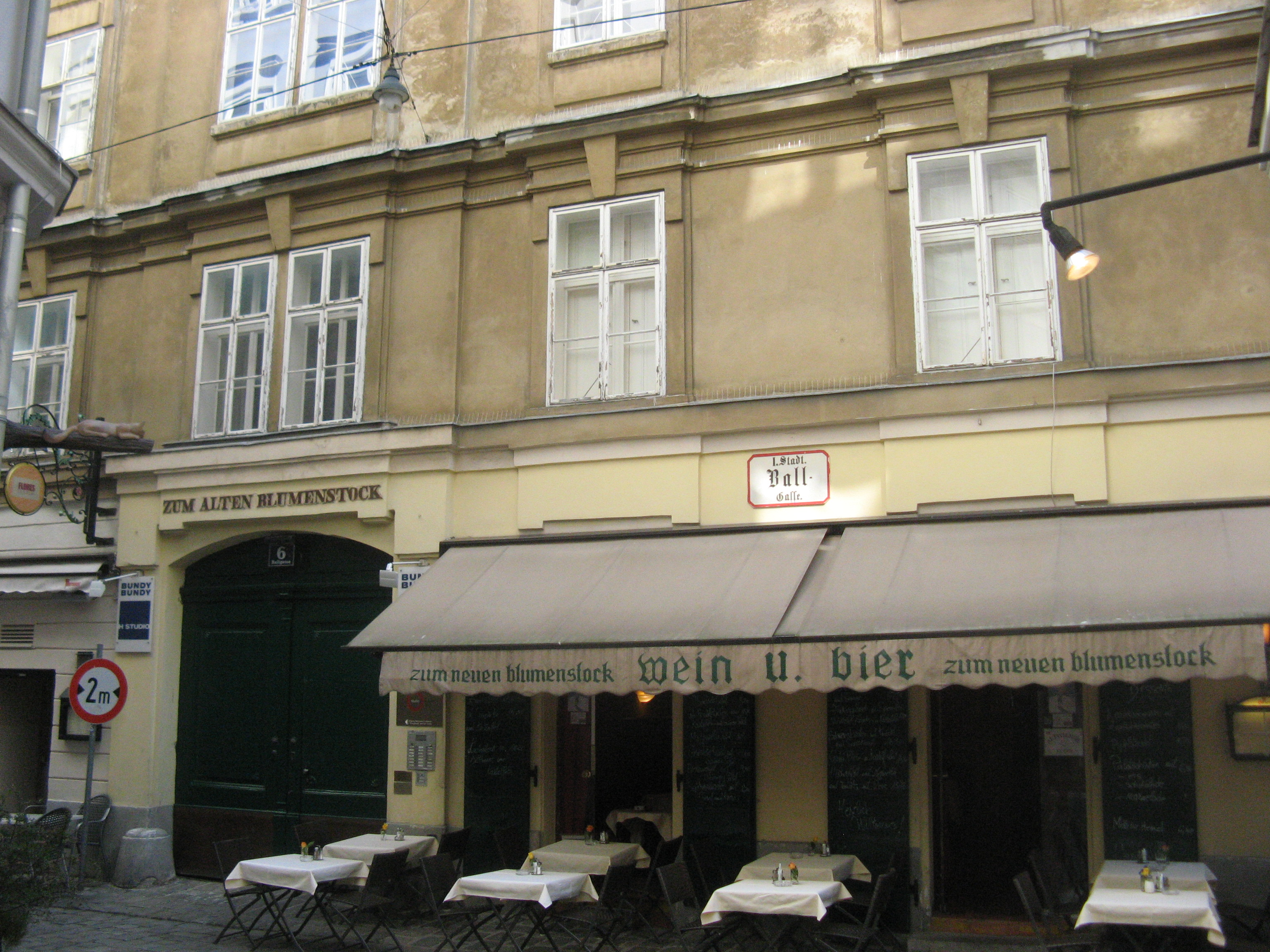 Zum alten Blumenstöckl, Ballgasse 6, Wien-Innere Stadt